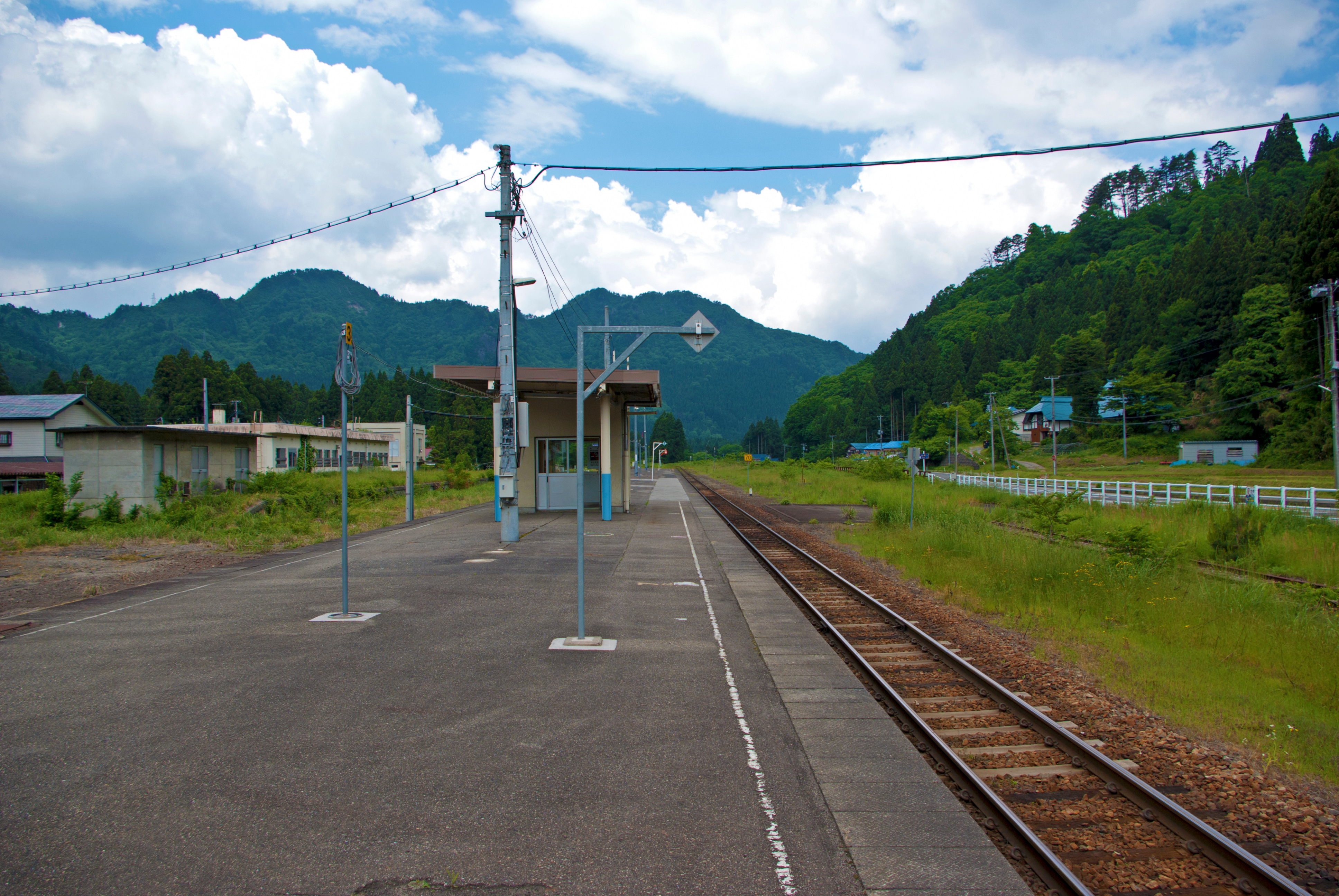 東日本旅客鉄道磐越西線日出谷駅